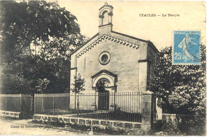 Le temple d'Etaules (Charente-Maritime) au début du XXe siècle